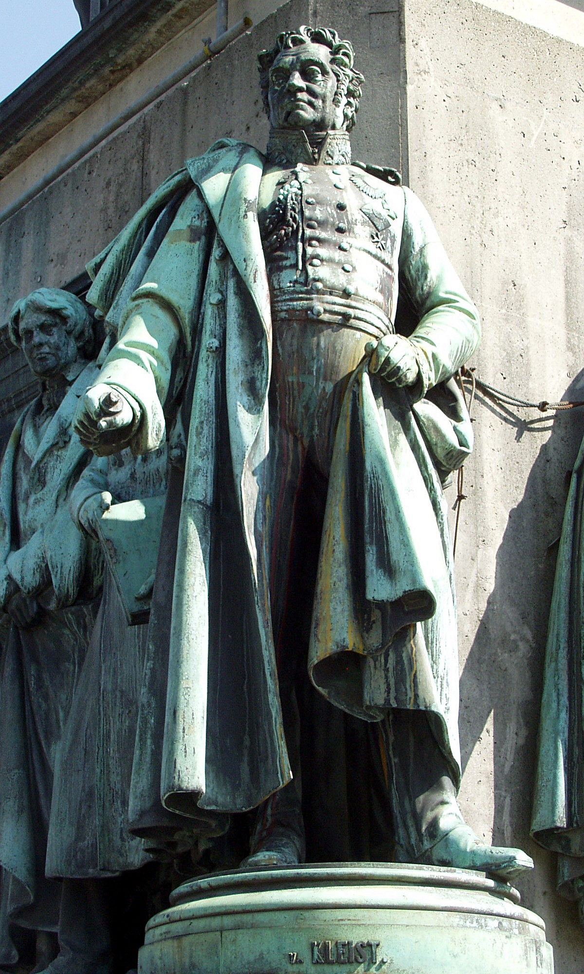 Friedrich Wilhelm III.-Reiterstandbild auf dem Kölner Heumarkt. Detail: Statue des Friedrich von Kleist.